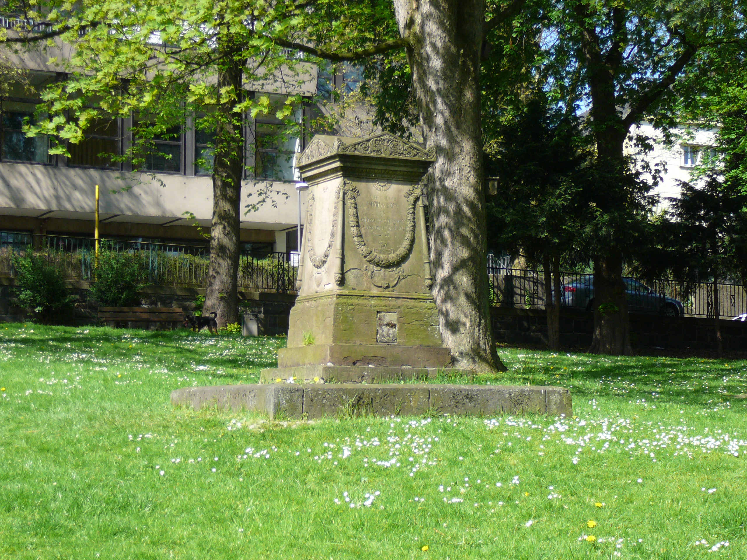 Else-Lasker-Schüler-Straße, Wuppertal